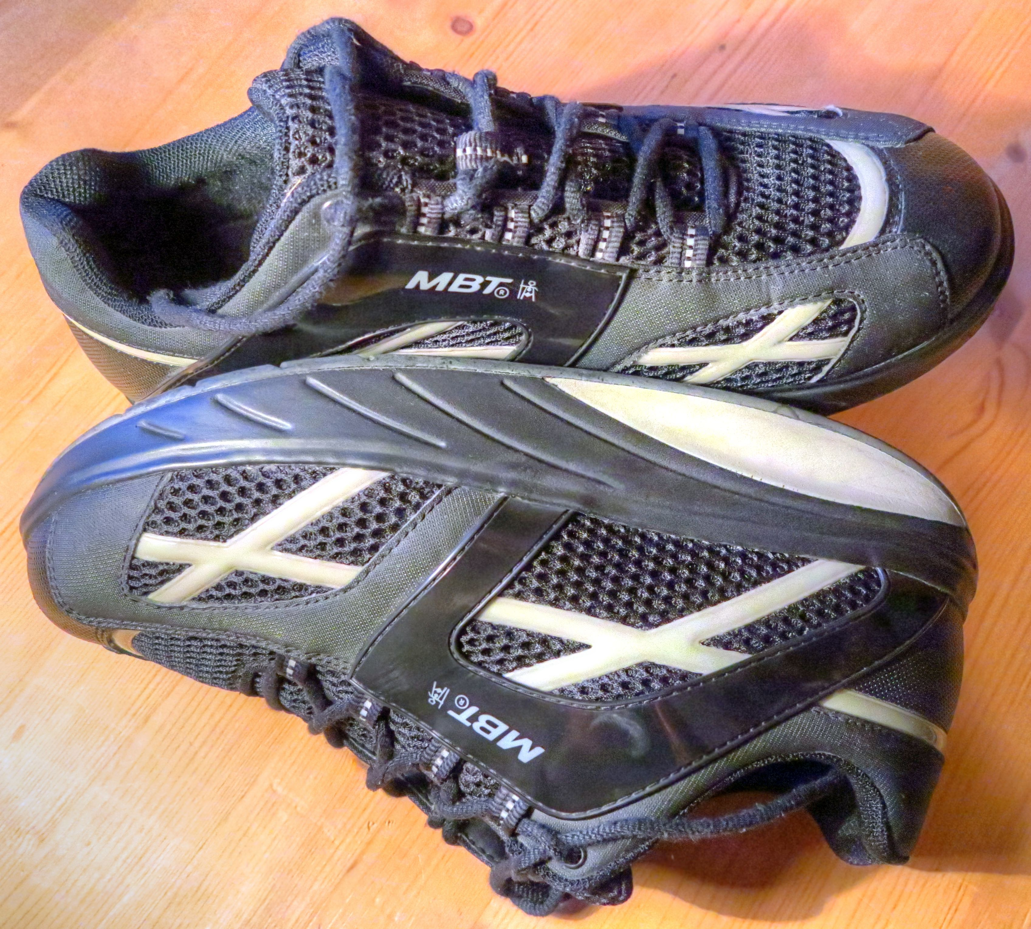 MBT (Masai Barefoot Technology) Schuh, M. Walk Men, Größe 43 2/3